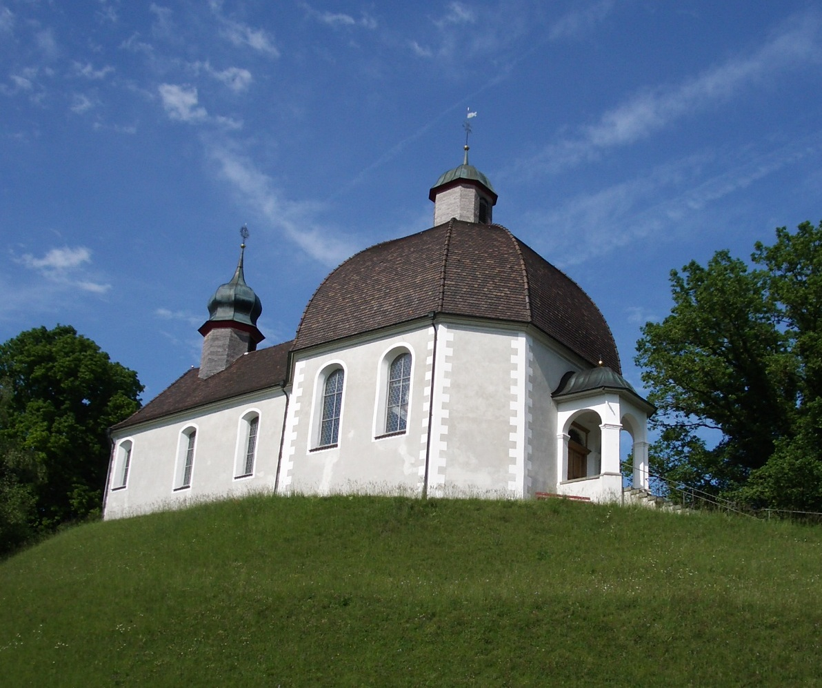 Oberwangen TG, Switzerland